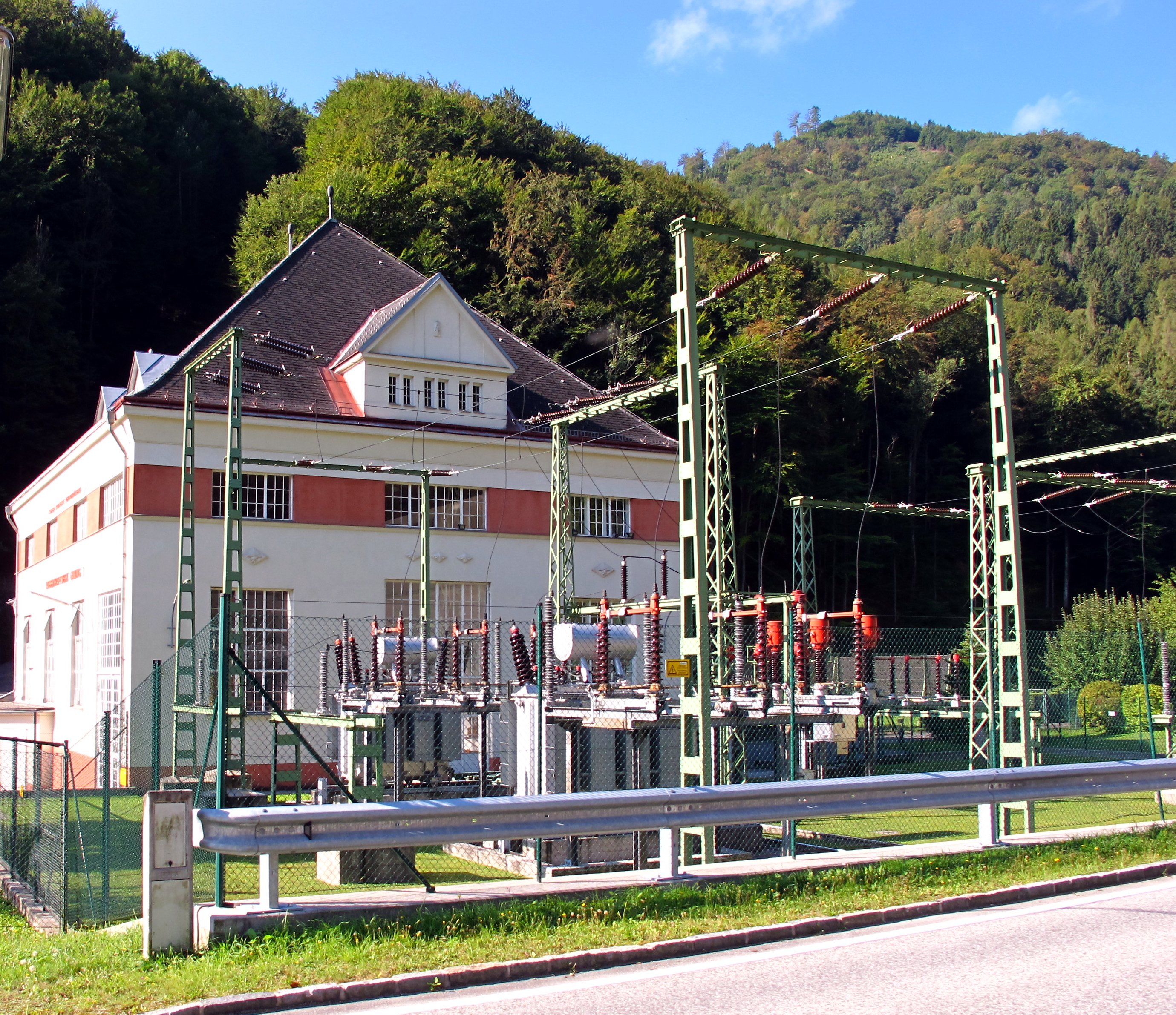 Wasserleitungskraftwerk Gaming I, Freiluftschaltanlage